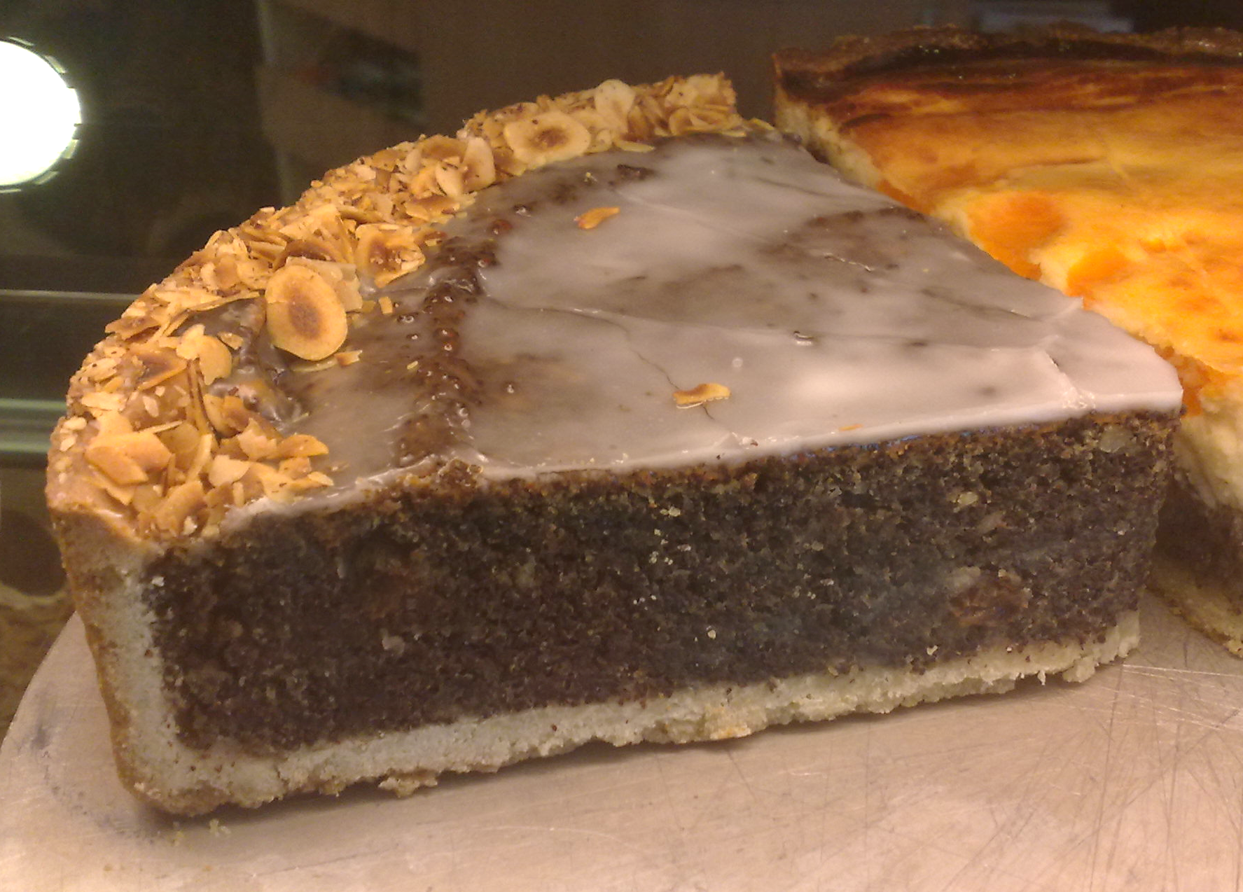 Original Schlesischer Mohnkuchen.